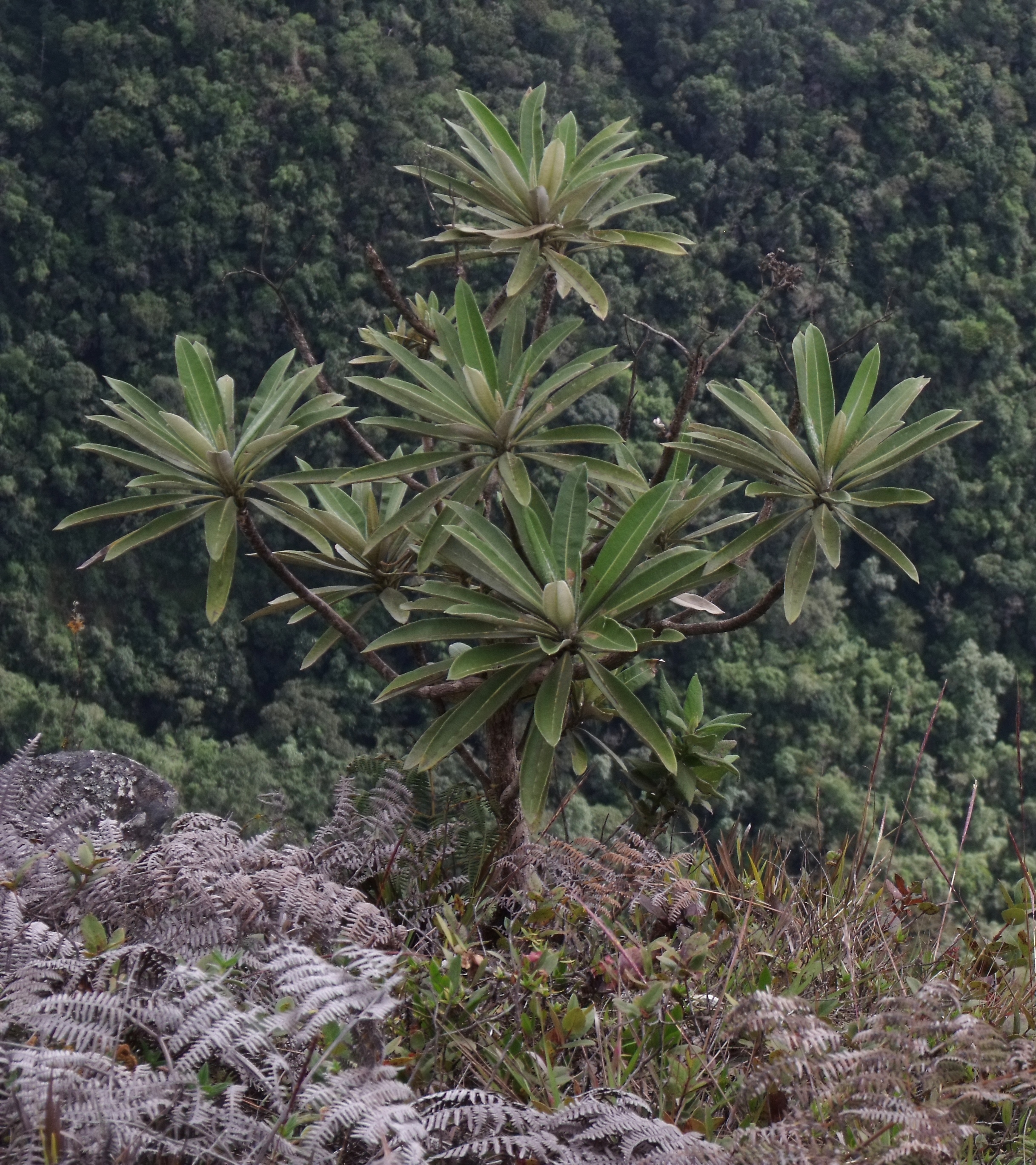 Inciencio, planta muy común en el Subpáramo (a partir de los 2.200 m.s.n.m.). Sirve para hacer té. Parque Waraira Repano (Ávila).